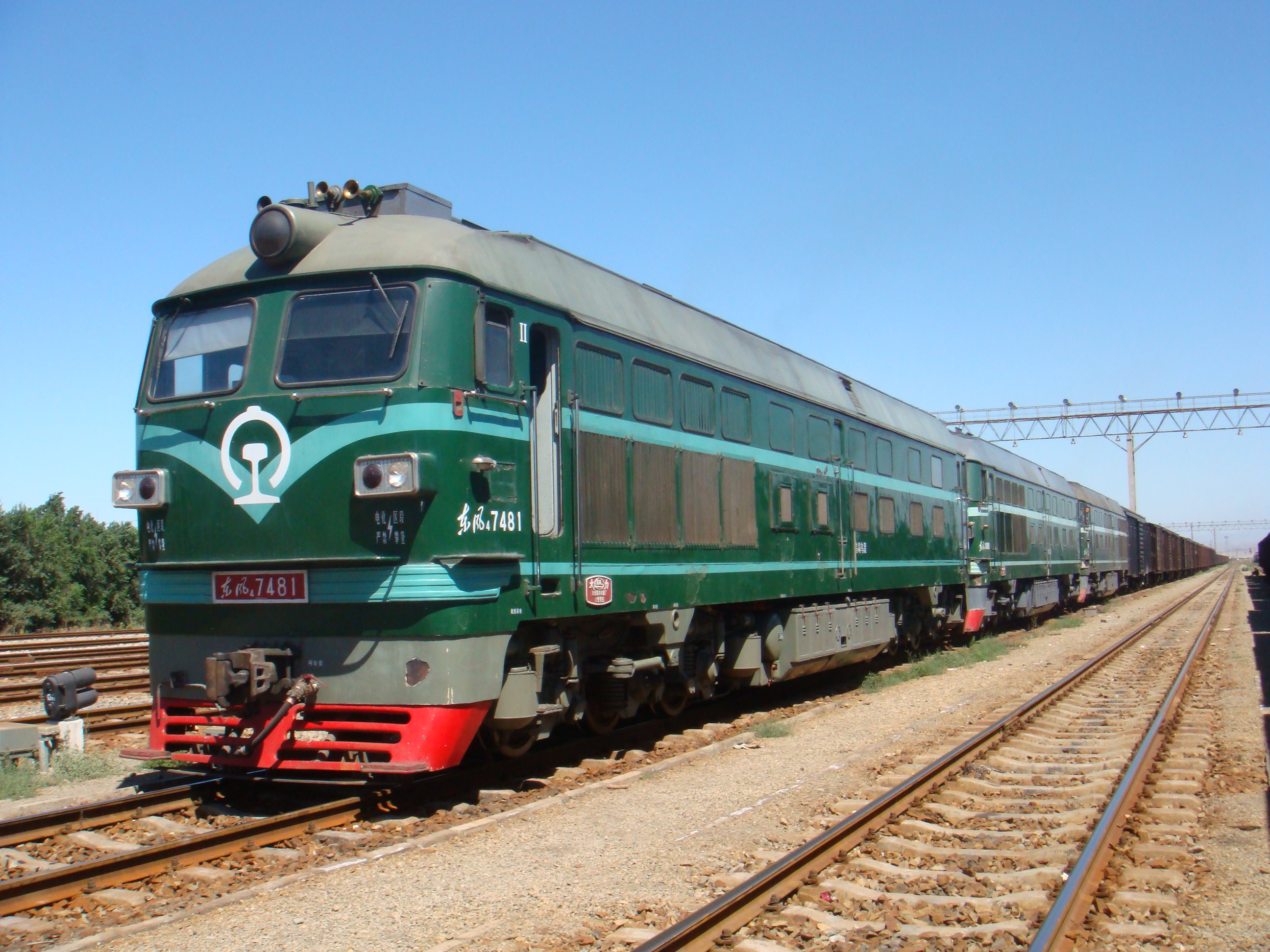 中国新疆乌鲁木齐市乌东站内的东风4B型7481号机车